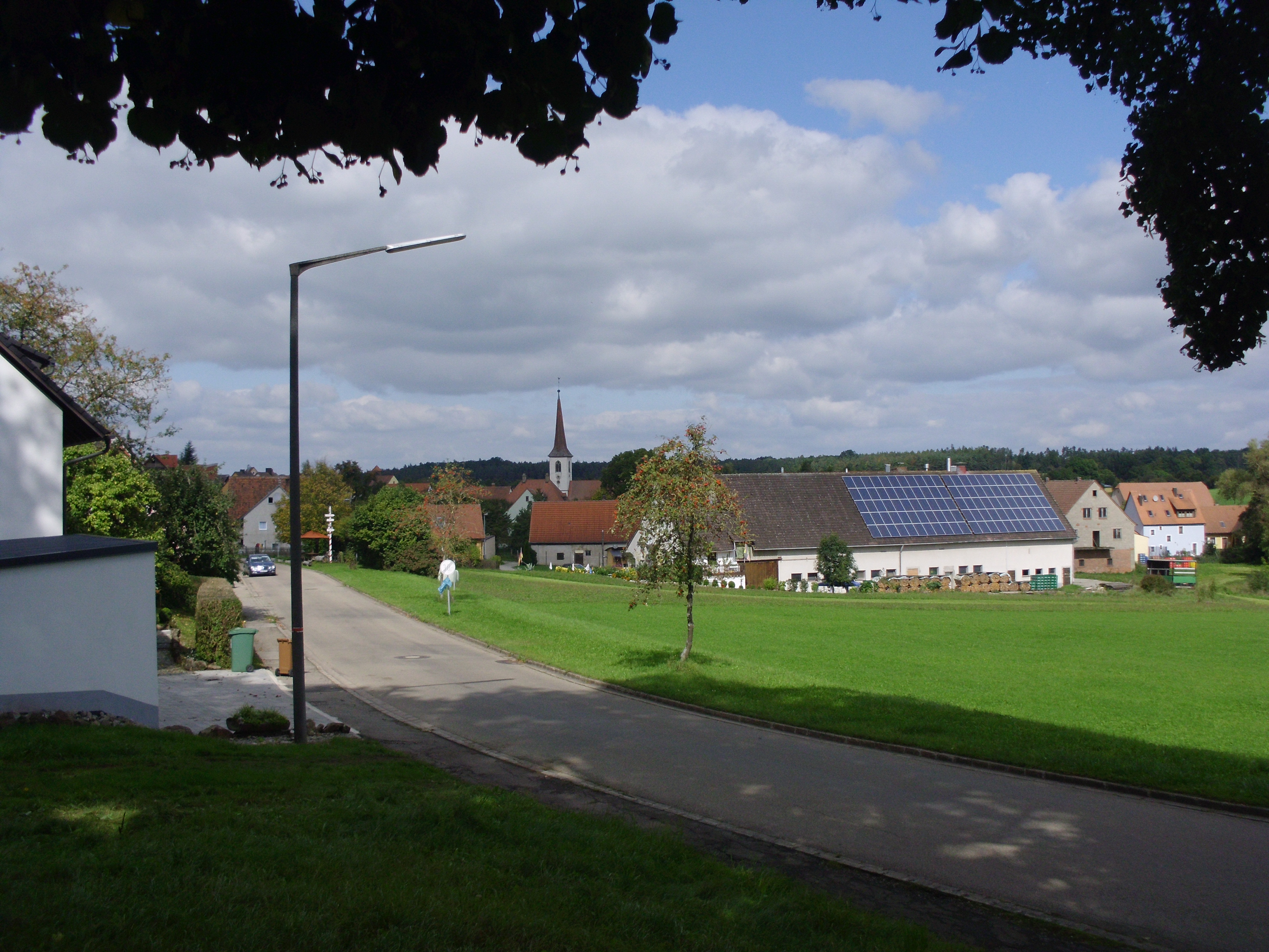 Jochsberg, Ortsteil von Leutershausen im Landkreis Ansbach